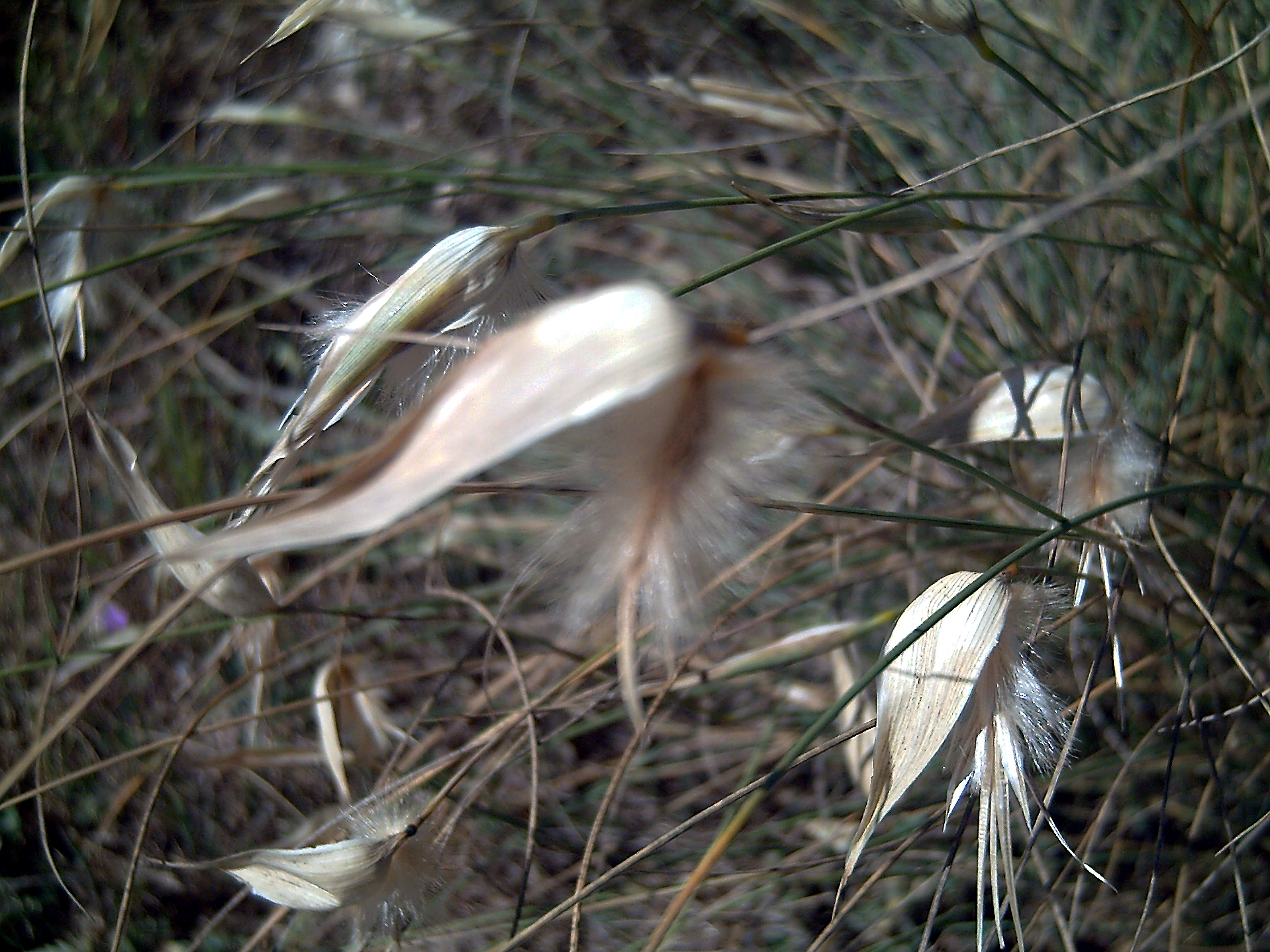 Lygeum_spartum en La Mata, Torrevieja, Alicante, Spain